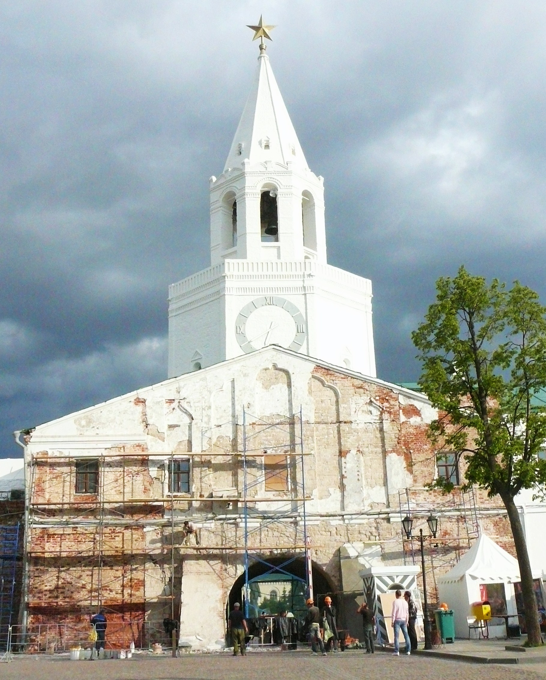 Спасская башня Казанского Кремля. Реставрационные работы (июнь 2011 г.).